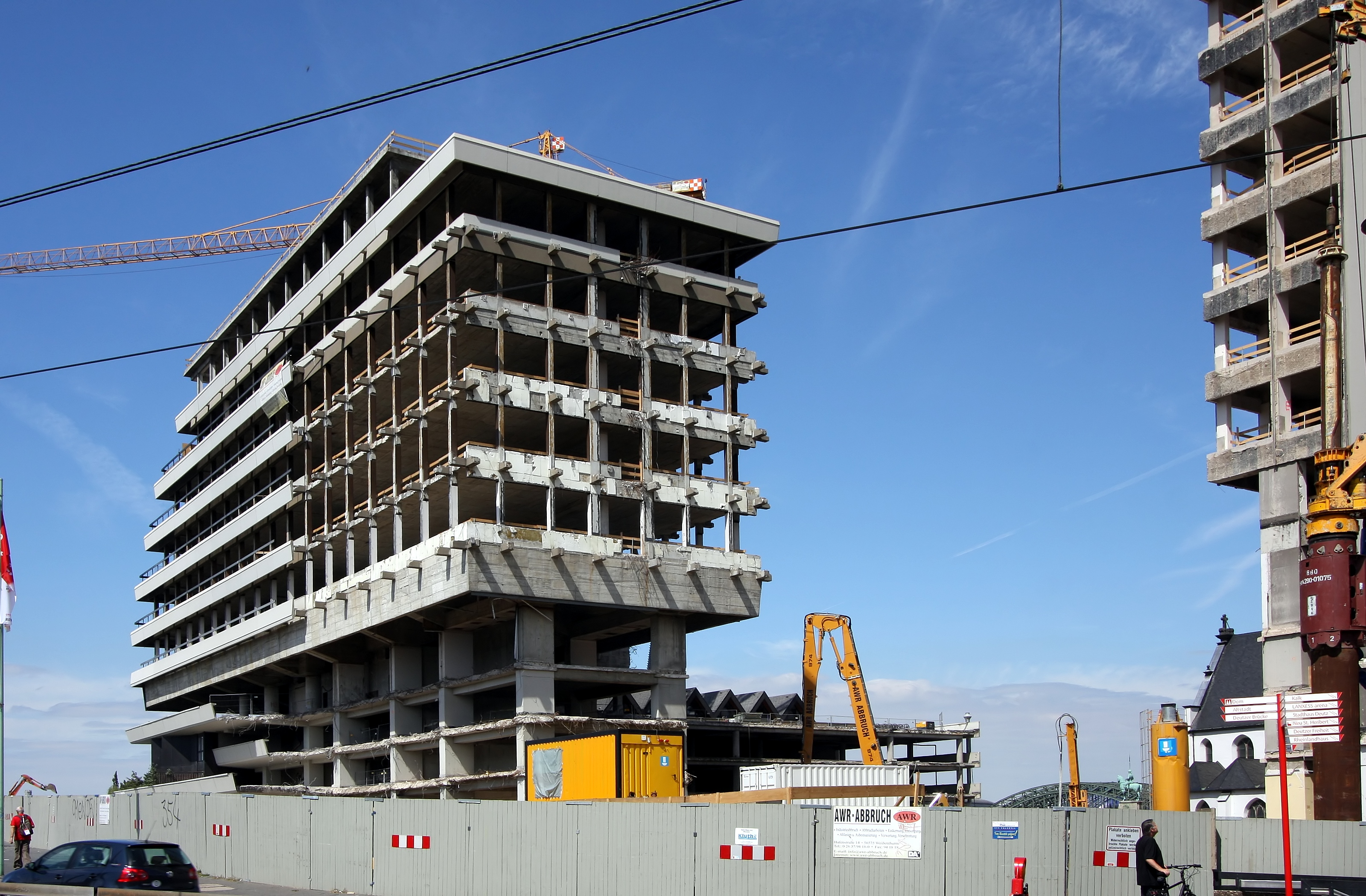 Die ehemalige Lufthansa-Zentrale in Köln-Deutz. Seit Sommer 2010 wird der Gebäudekomplex kernsaniert und wird künftig maxCologne heißen.)